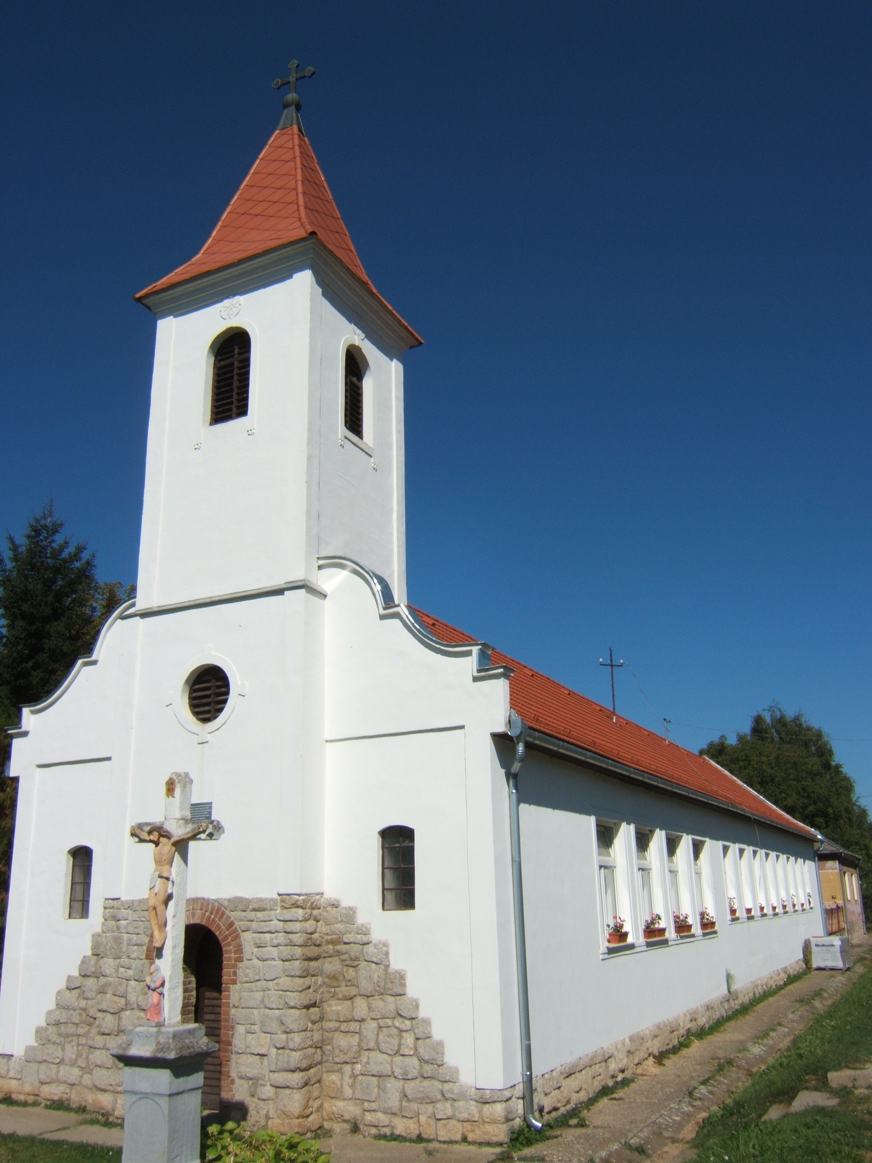 Dinnyeberki temploma